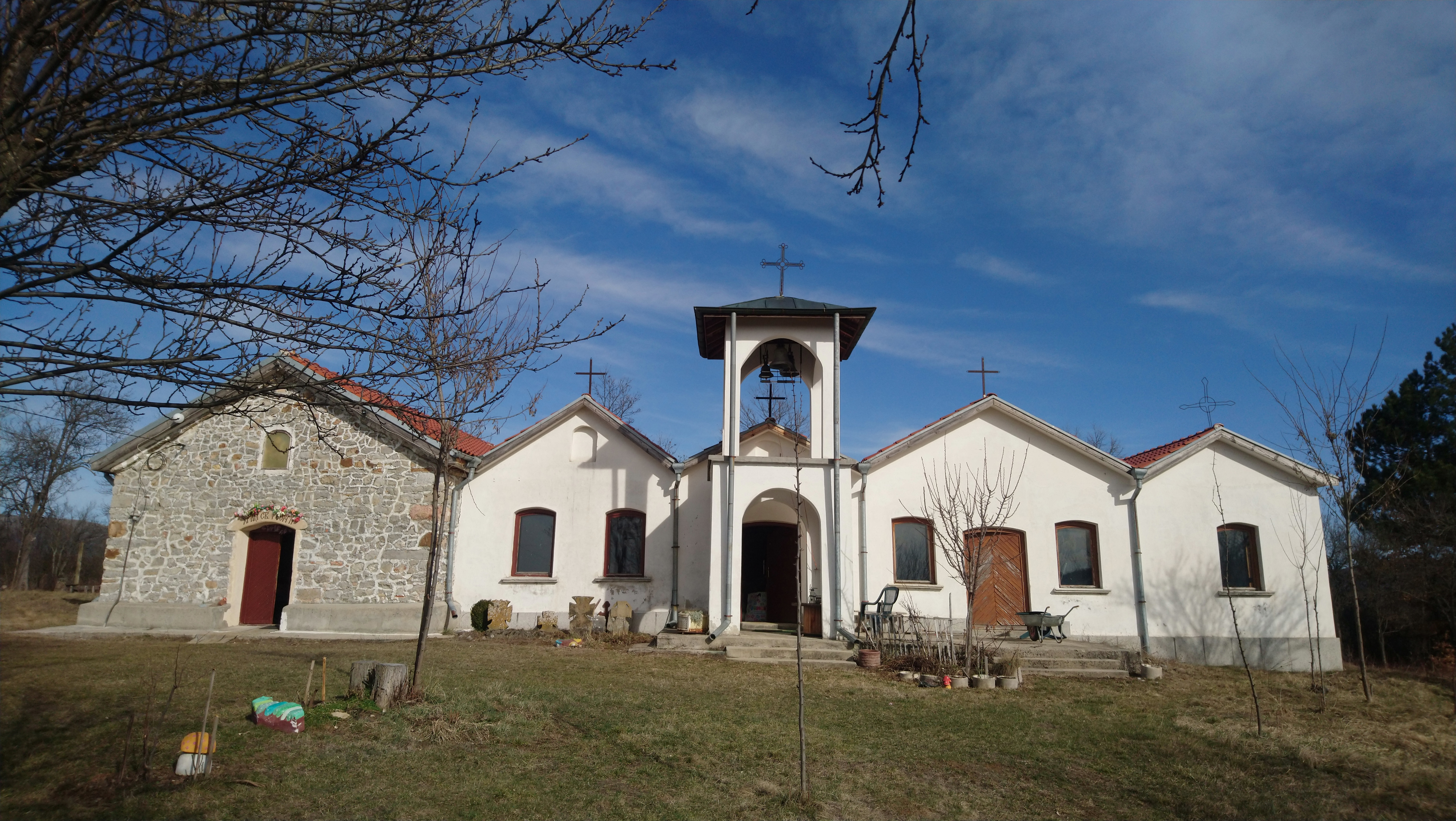 Букоровски манастир Св. Георги Победоносец